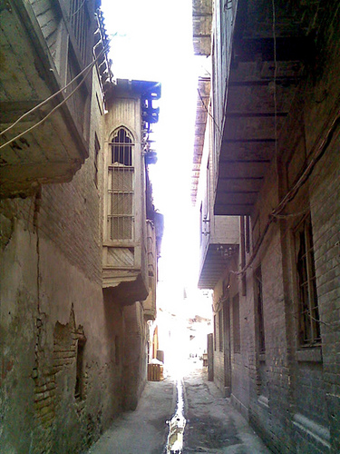 Baghdad